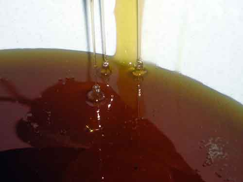 med,honig,honey